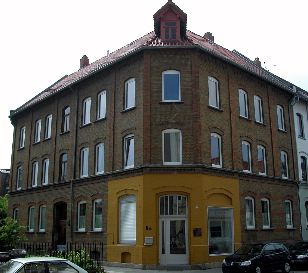 Braunschweig: Madamenweg 6a (ehemals 4). In diesem Haus lebte der spätere Schauspieler Gustav Knuth bis zu seinem 17. Lebensjahr.